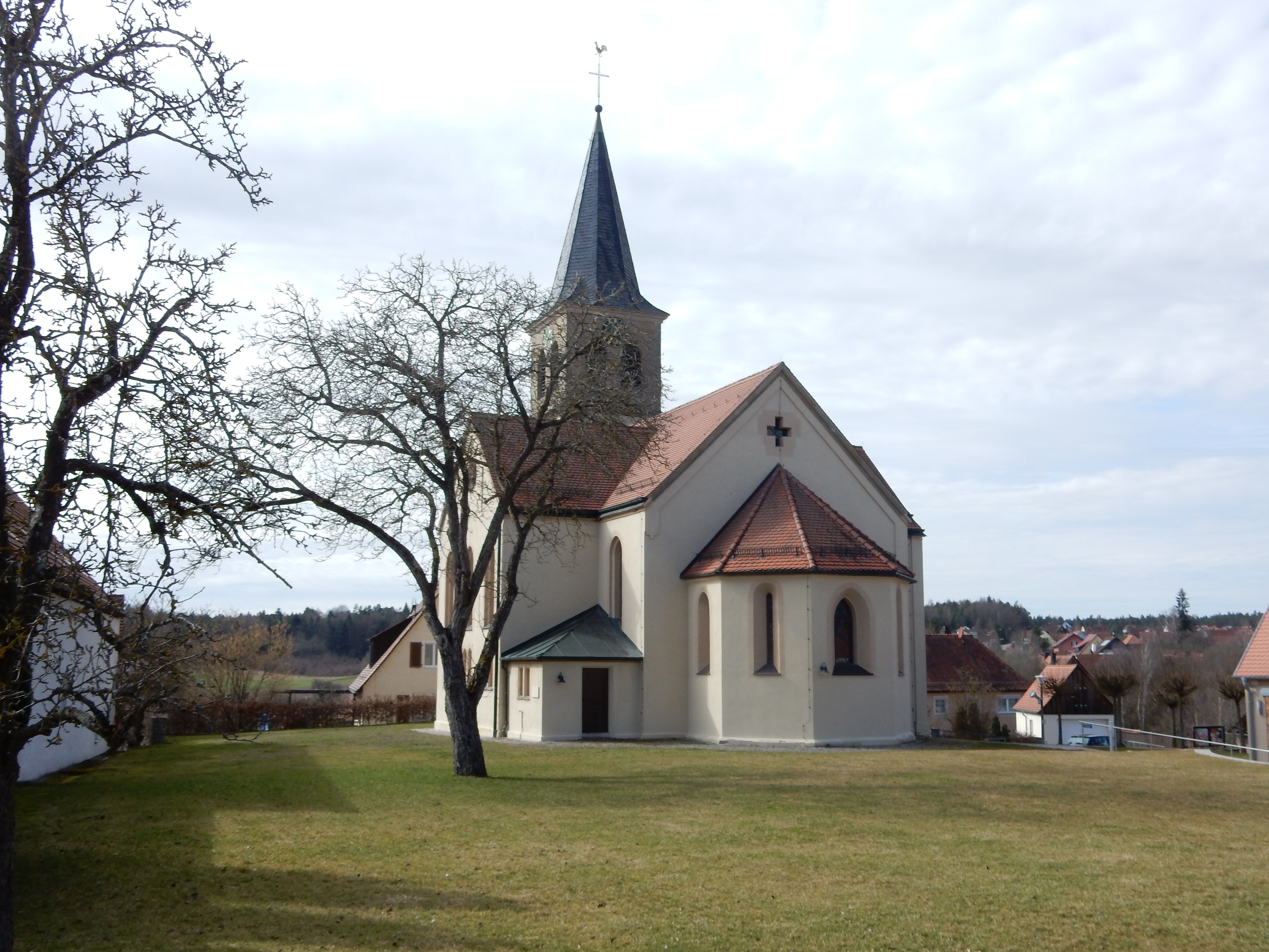 Klosterhofgasse 5 Evangelisch-lutherische Pfarrkirche St. Ursula Kreuzförmiger Satteldachbau im historisierenden Stil, 1863, eingezogener Polygonalchor und Westturm mit Spitzdach spätgotisch, 15. Jahrhundert; mit Ausstattung D-5-71-132-2